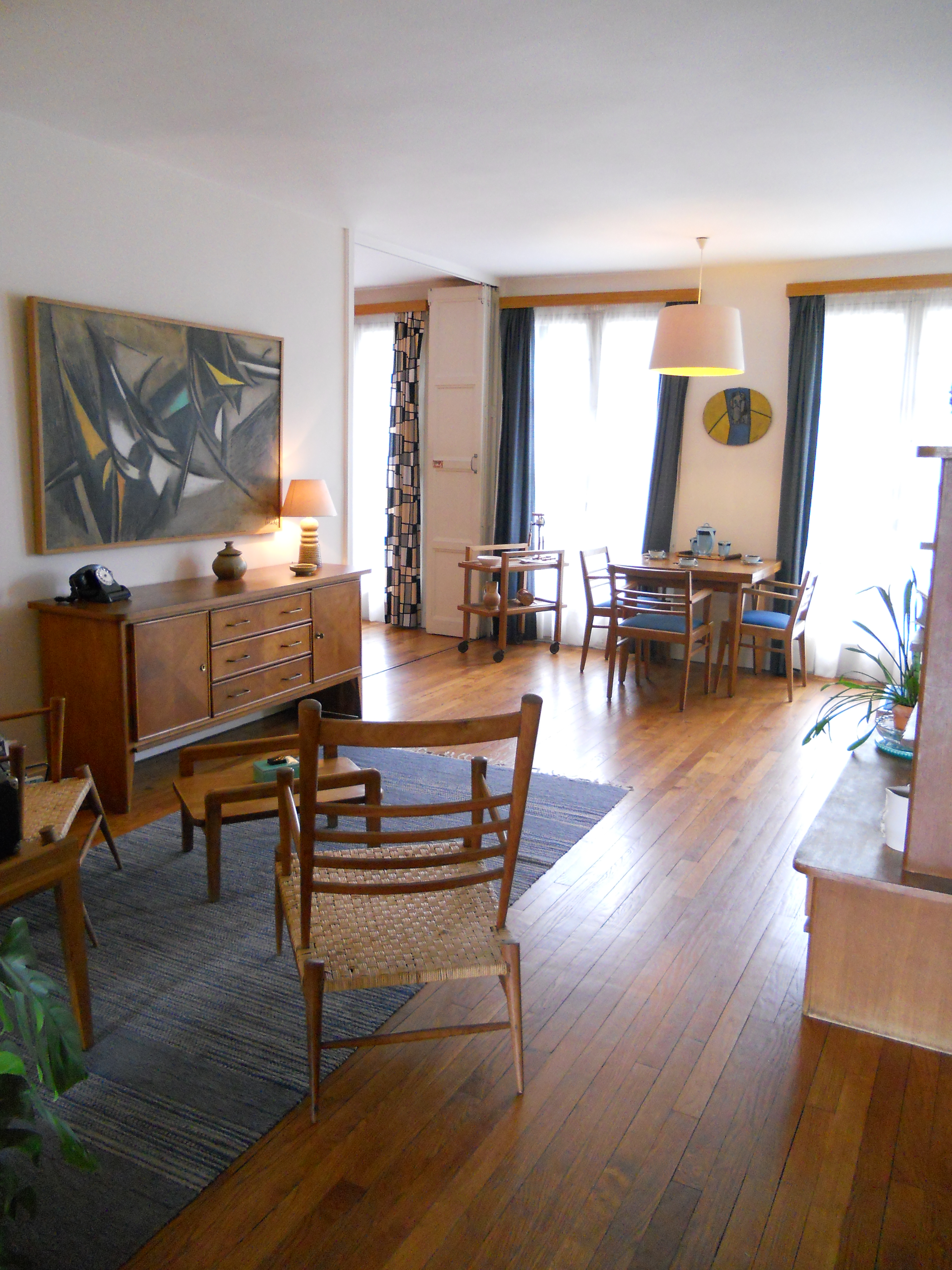 Salle de séjour de l'appartement Témoin Perret au Havre . Elle est composée de meubles dessinés par René Gabriel en 1946 dans le " style reconstruction " ( comparable au Style 58 en Belgique ). Cette salle de long séjour, bien éclairé par deux fenêtres, mesure 22 m² et sert à la fois de salon et de salle à manger sans être ni l'un ni l'autre .